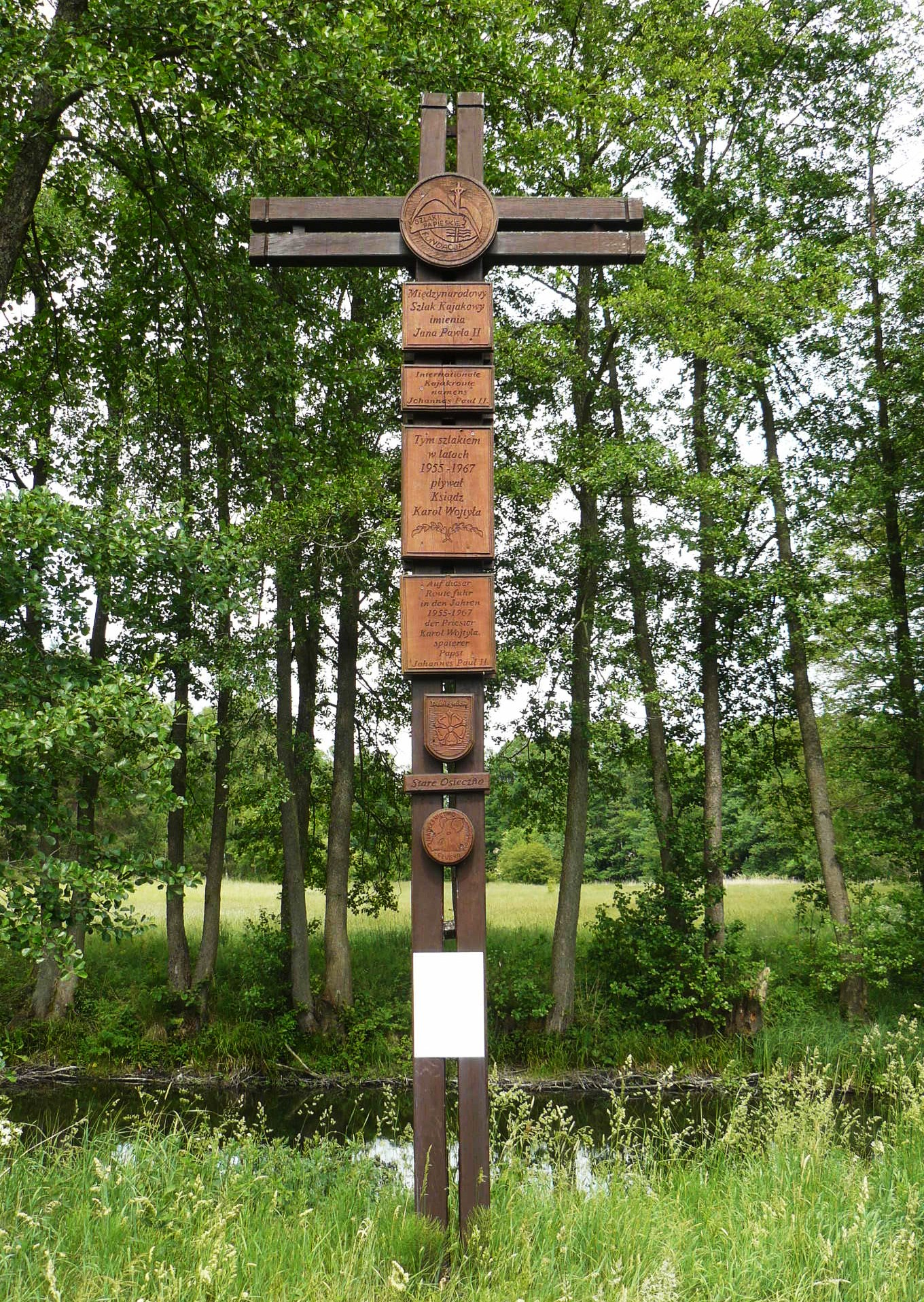 Rzeka Drawa w Starym Osiecznie.